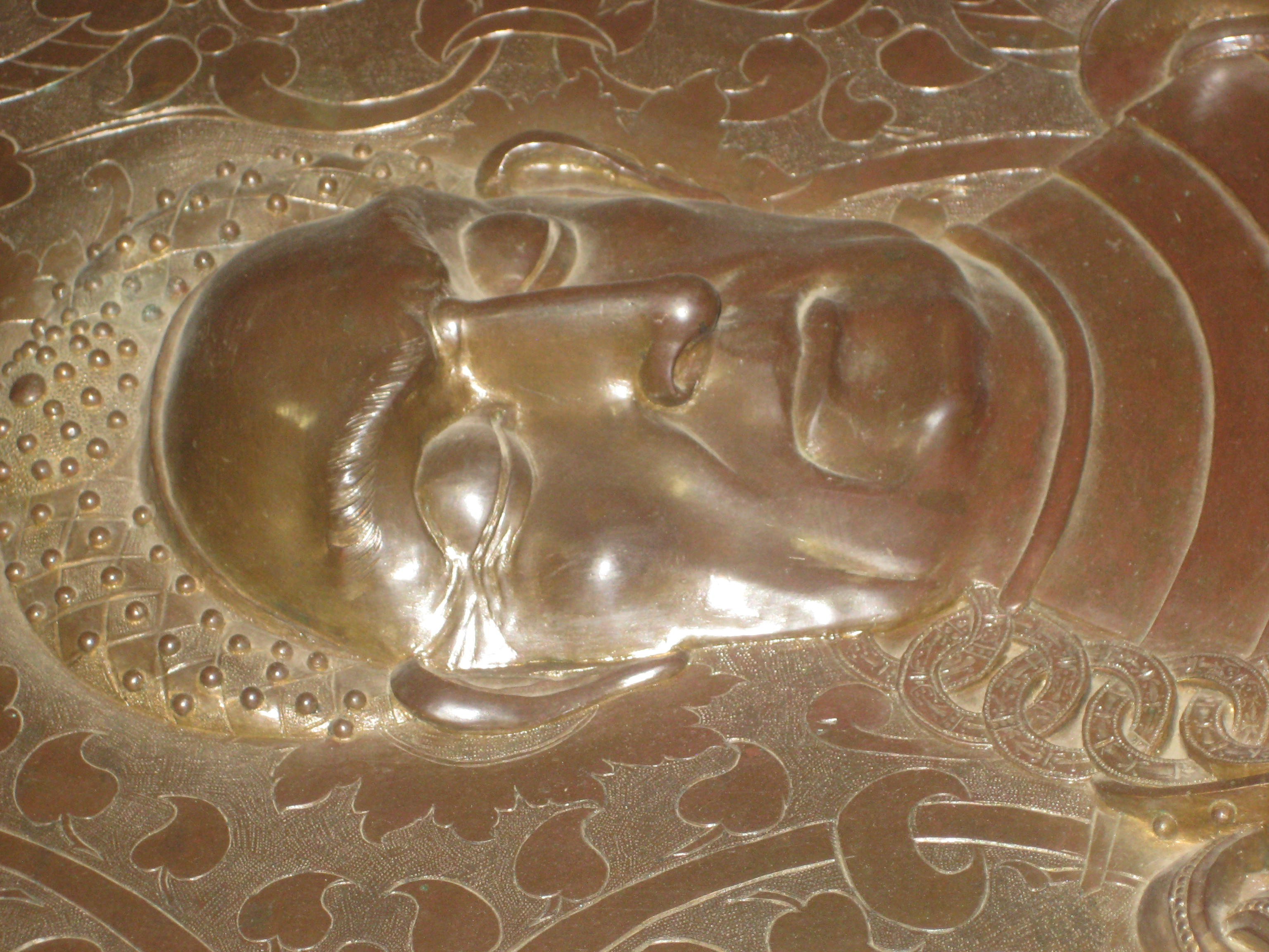 Zdjęcie zrobione zostało w kolegiacie w Opatowie